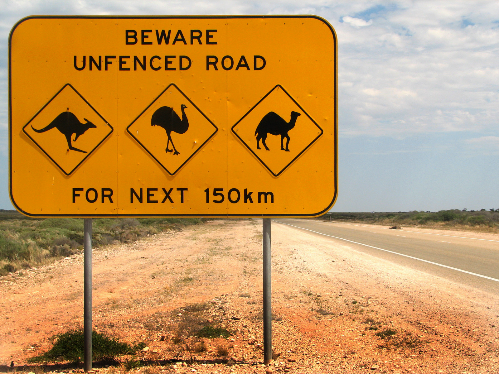 Panneau routier australien annoncant que la route n'est pas clôturée. Noter le chameau qui est une espèce introduite devenue localement invasive (Australie), et les traces de balles et plomb de chasse.